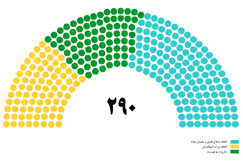 این آمار بعد از دور اول به دست آمده و قطعا بعد از مرحله دوم انتخابات مجلس دهم تغییر خواهد کرد.